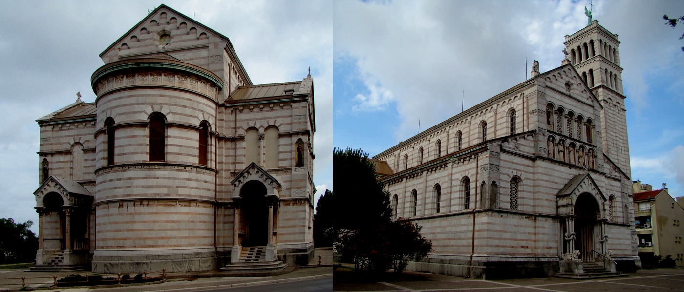 Crkva Gospe od mora, Pula